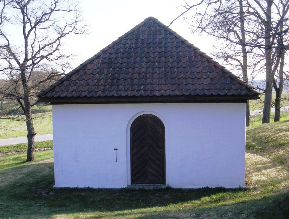 Lützows kapell ved Tomb kirke. Bak det går fylkesvei 354.